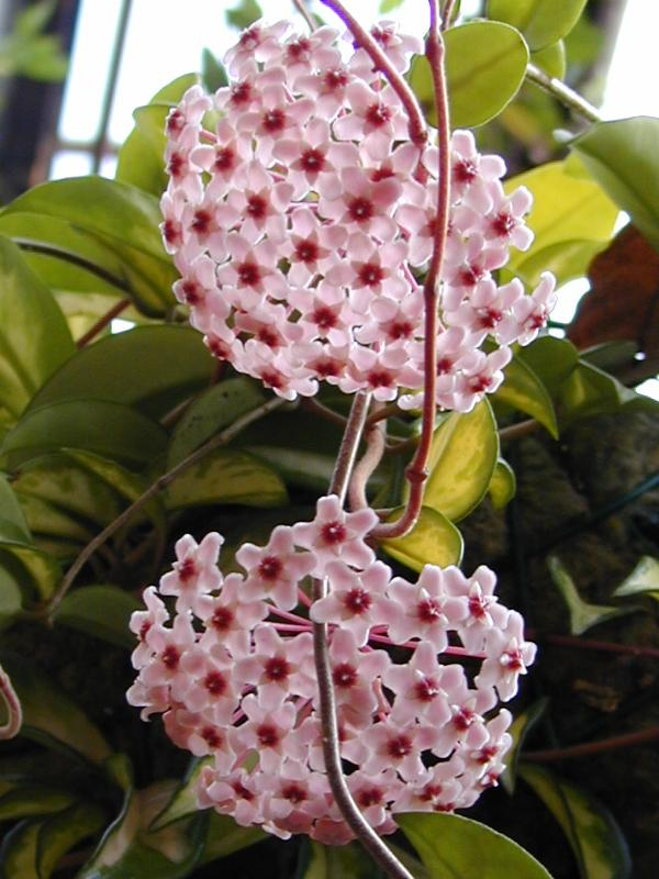 Hoya carnosa 'Exotica'